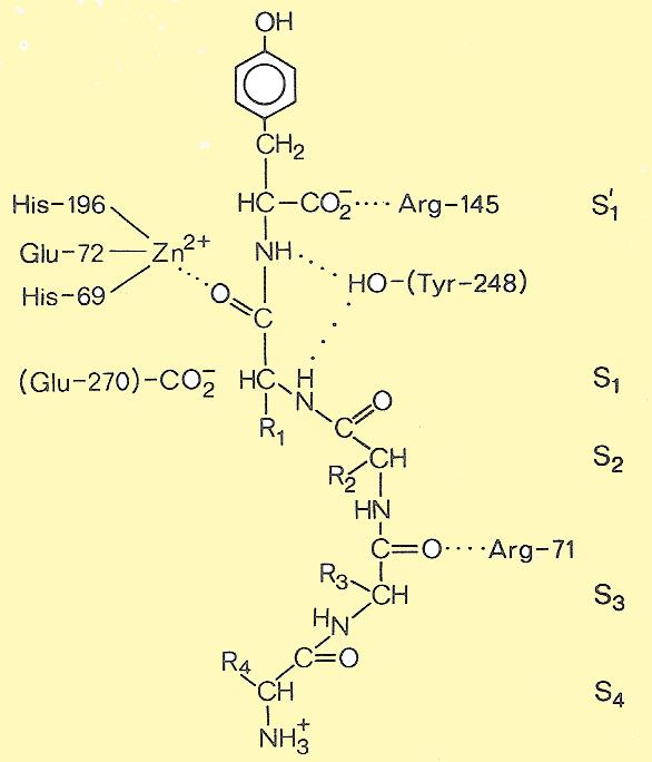 Complex postulat unit productivament, de la carboxipeptidasa A i un substrat polipèptid.